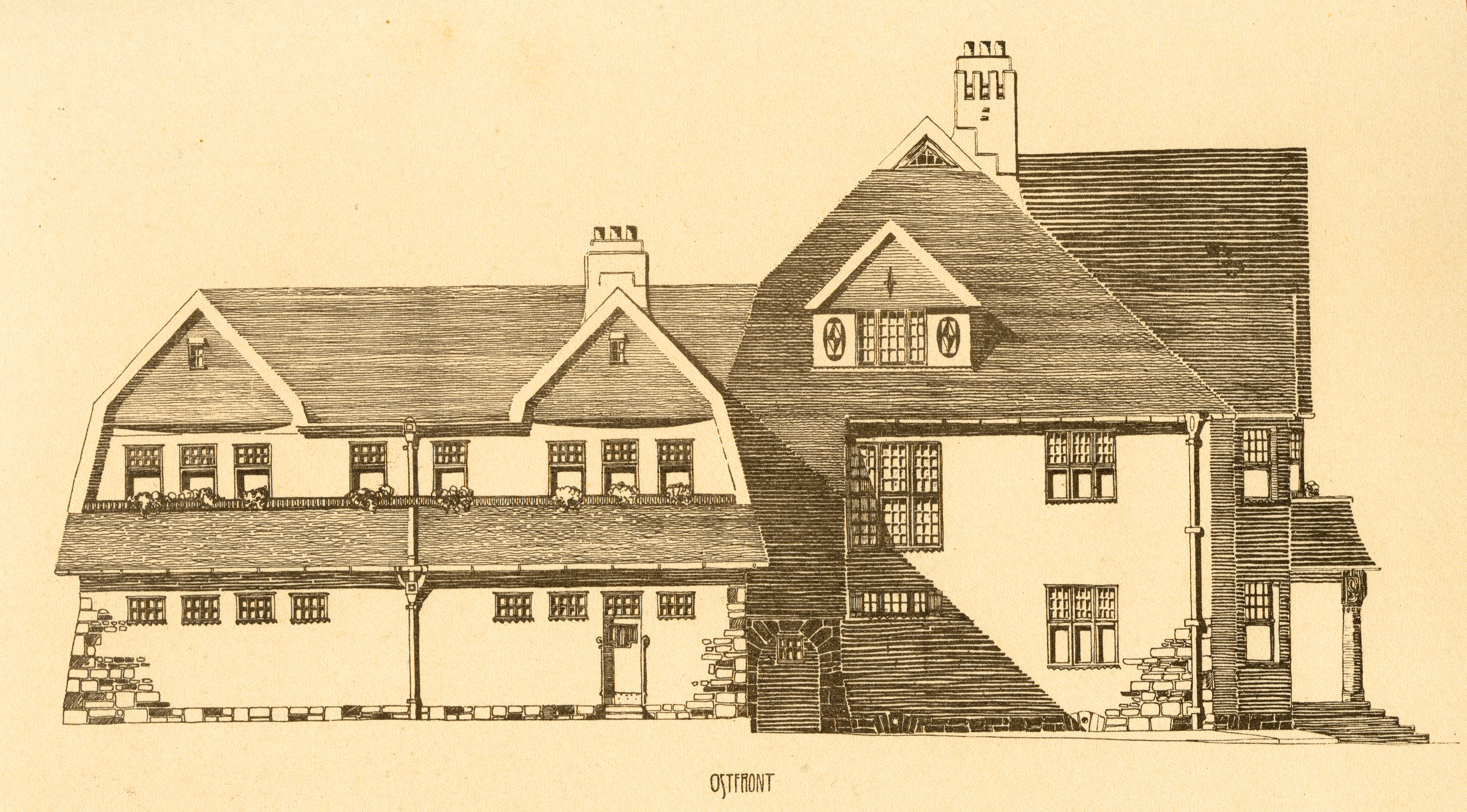 Mappenwerk „Aus dem künstlerischen Nachlass von Dr.-Ing. Ferdinand Eichwede. Architekturen, Reisestudien, Radierungen und Handzeichnungen“ Ausschnitt von der circa 30 x 48 cm großen und einseitig bedruckten Tafel 60, untertitelt „Landhaus für Alma Eichwede in Isernhagen bei Hannover“ sowie „Gedruckt und verlegt bei Ernst Wasmuth, A.-G., Berlin“ hier die obere von zwei Zeichnungen mit dem Titel "Ostfront" ...